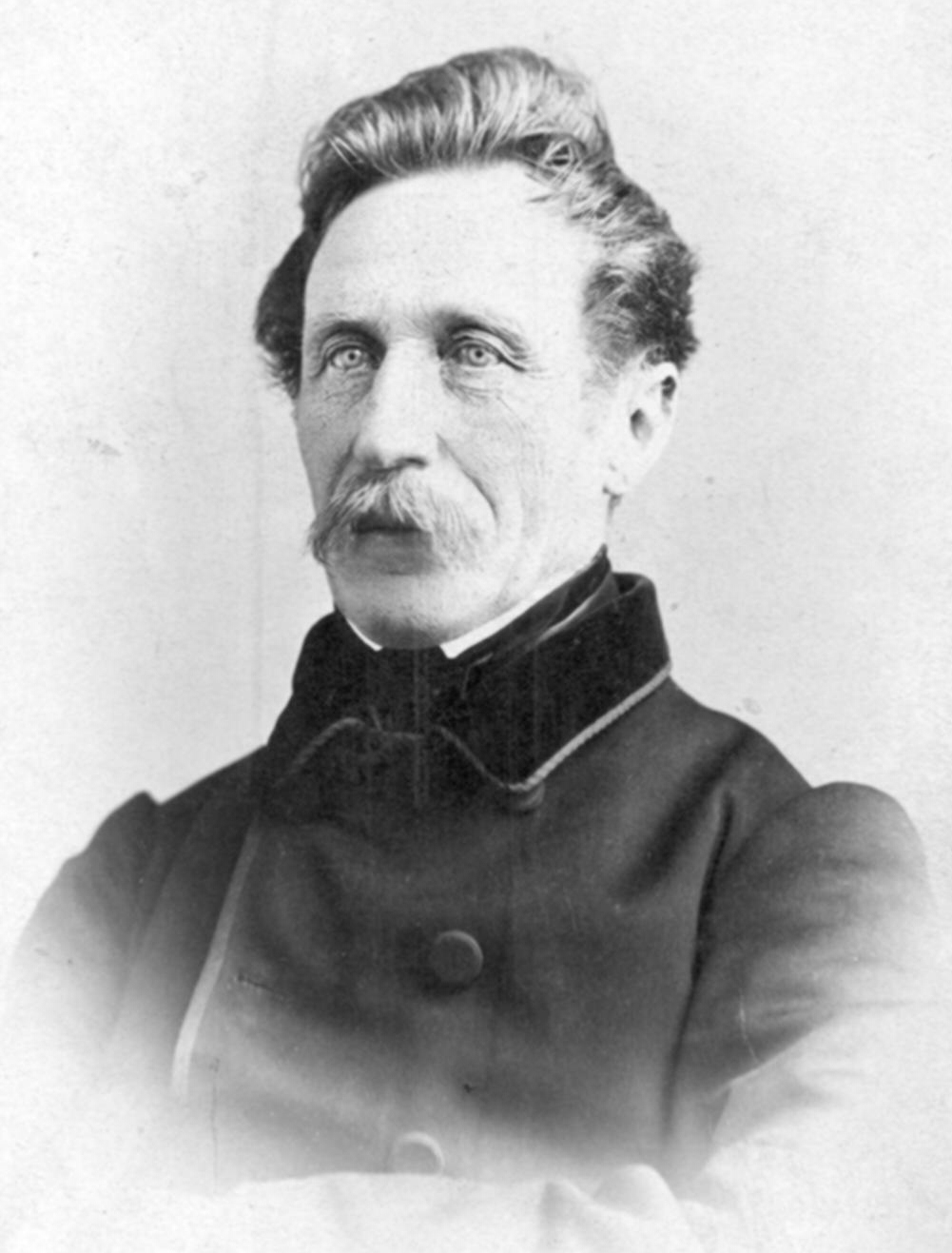 Professor Franz Keller (1807-1870), Leiter des Oberbaus beim Bau der Badischen Hauptbahn